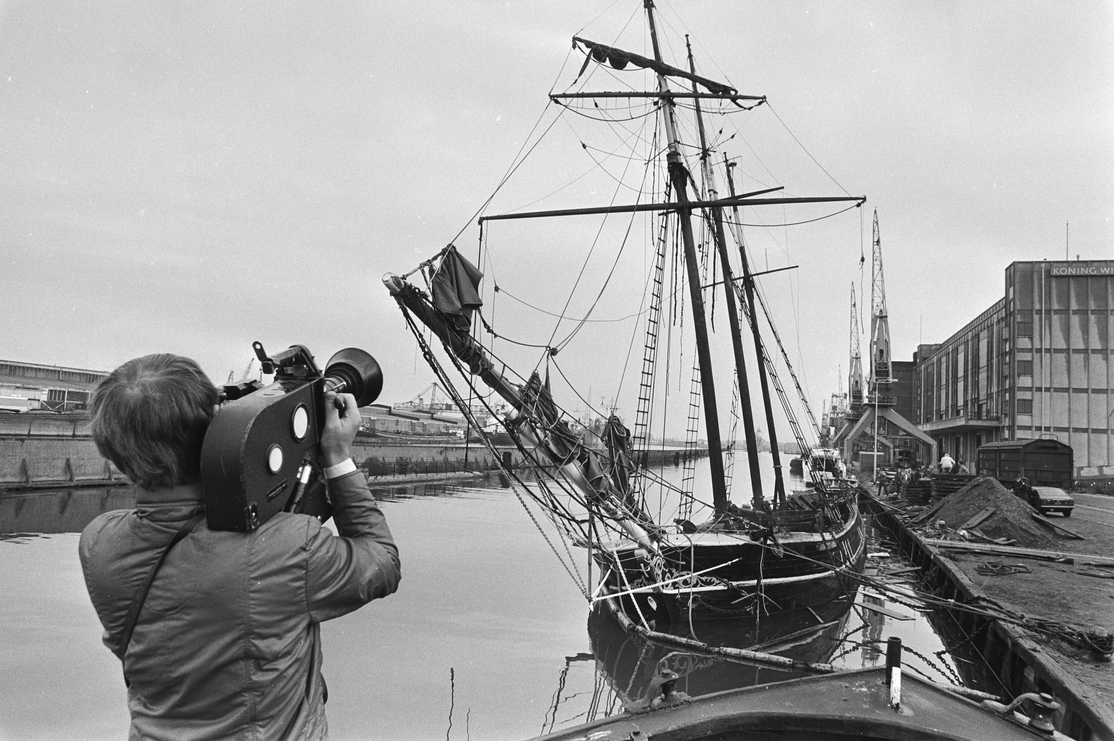 Het schip Charlotte Rhodes, het schip uit de tv-serie The Onedin Line, uitgebrand in Amsterdam. Gemeentelijk Handelsentrepotdok Oost (Amsterdam), 12 oktober 1979